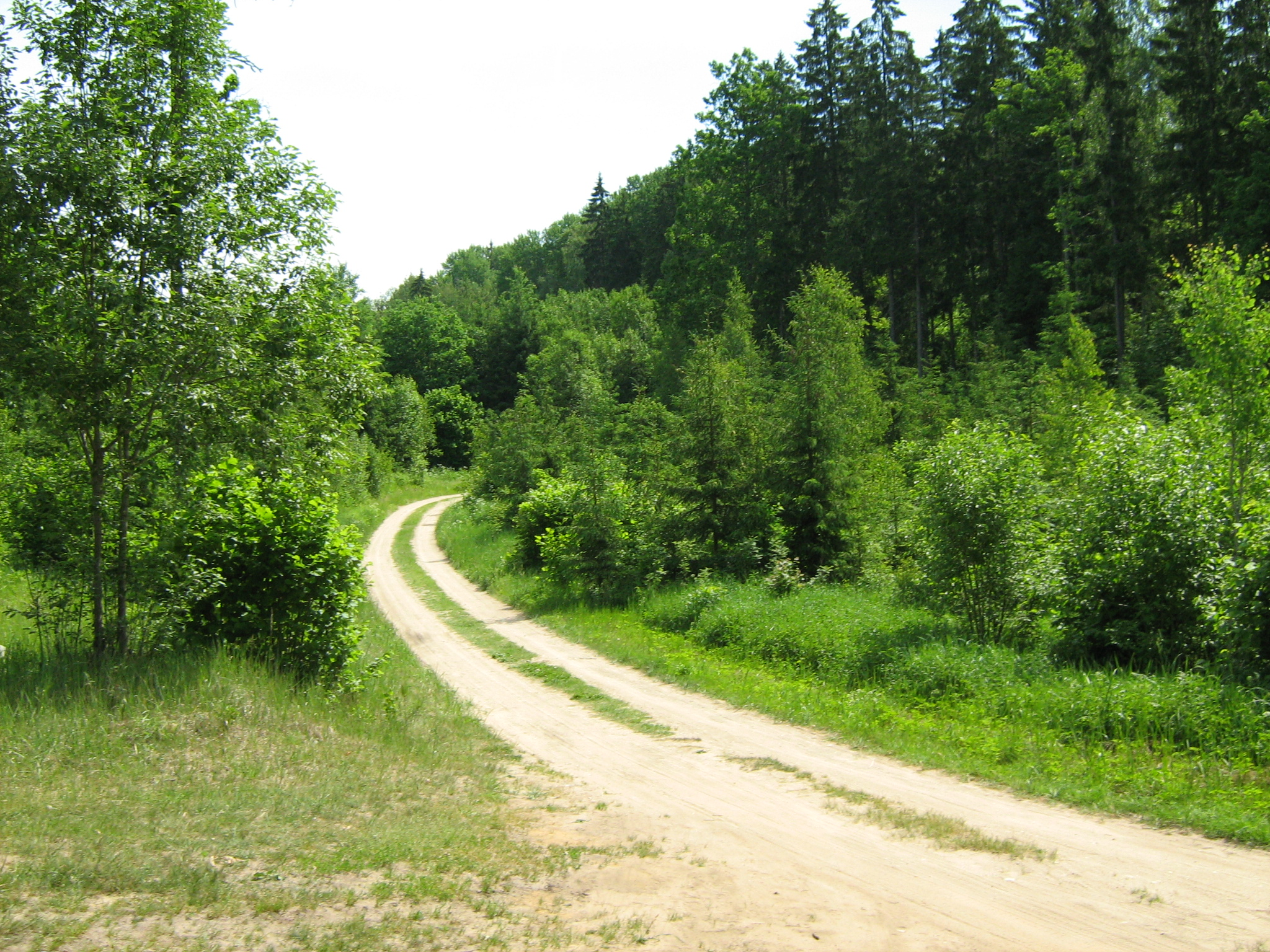 Miško takas